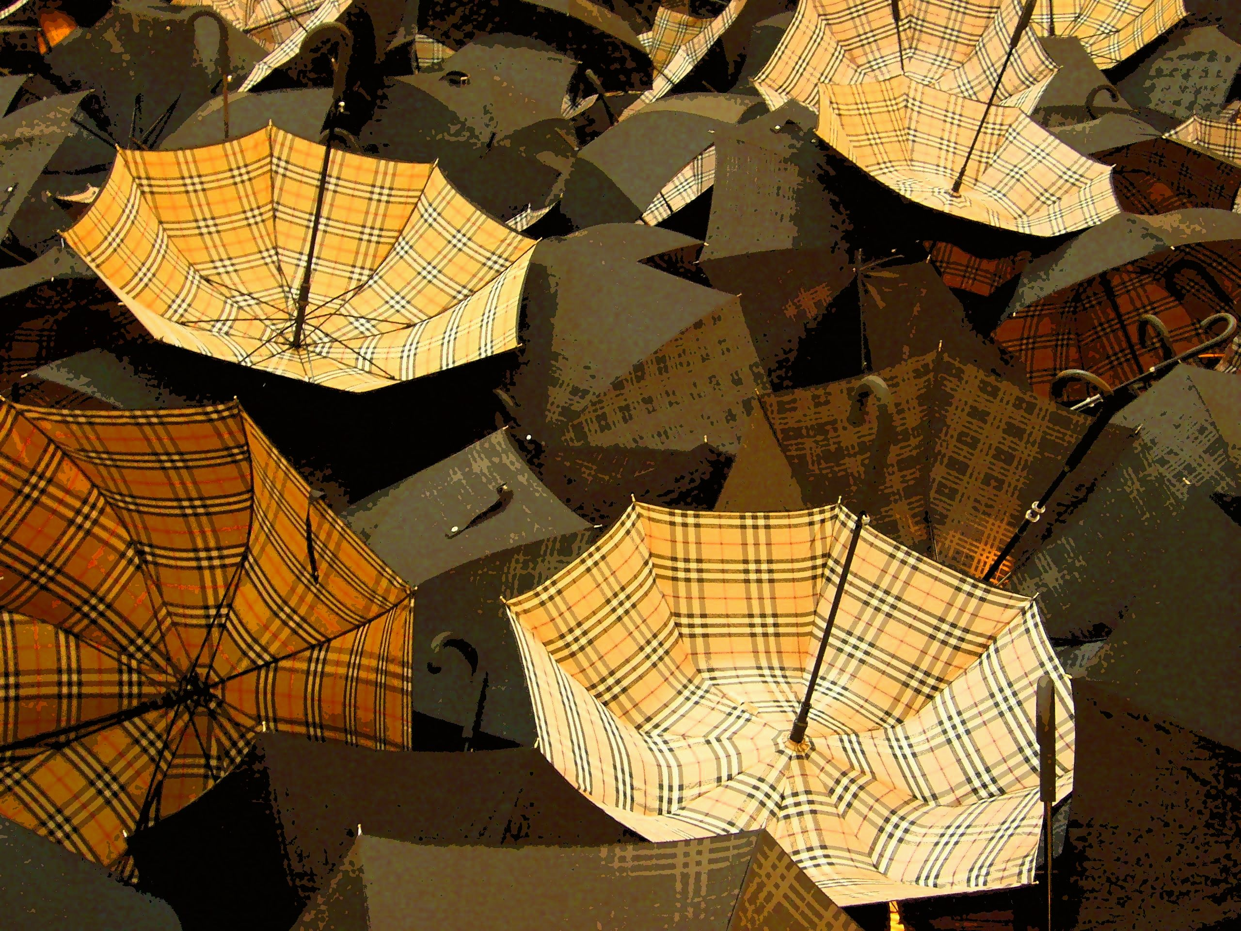 Parapluies en imprimés tartan, dans un magasin Burberry à Singapour.